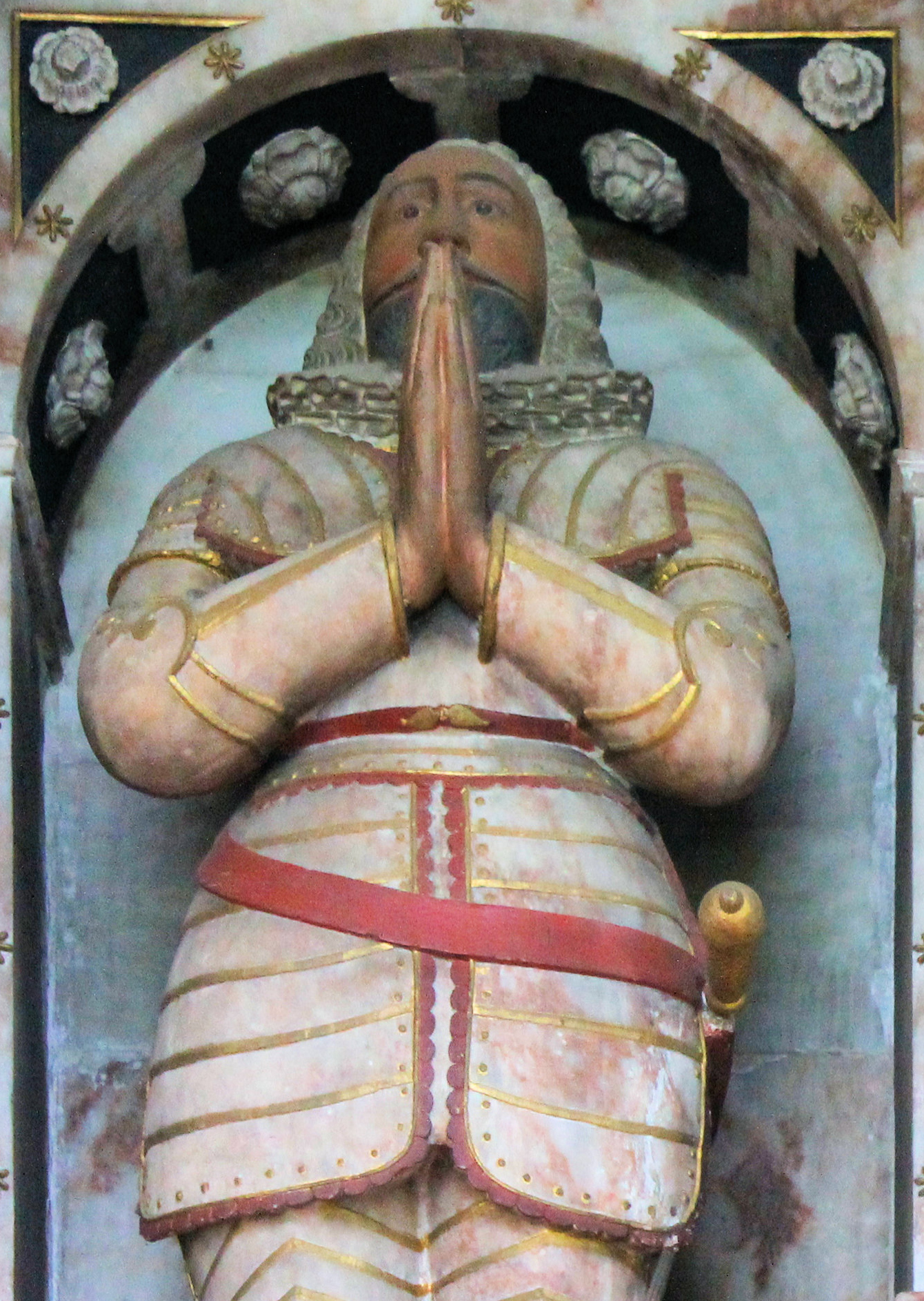 Beddrod Richard Trevor (1558 - 1638) yn Eglwys yr Holl Seintiau, Gresffordd ger Wrecsam. Uchelwr, milwr yn Iwerddon ac etifedd Ystad Trefalyn.